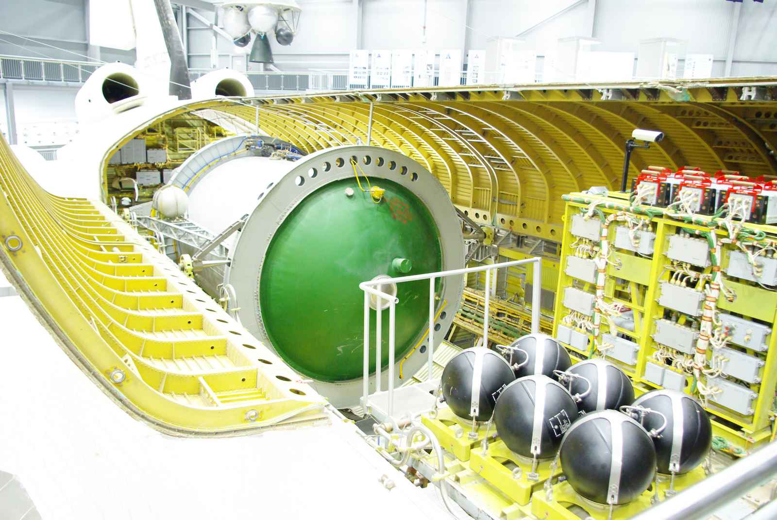 БТС 002 в техническом музее Шпайера